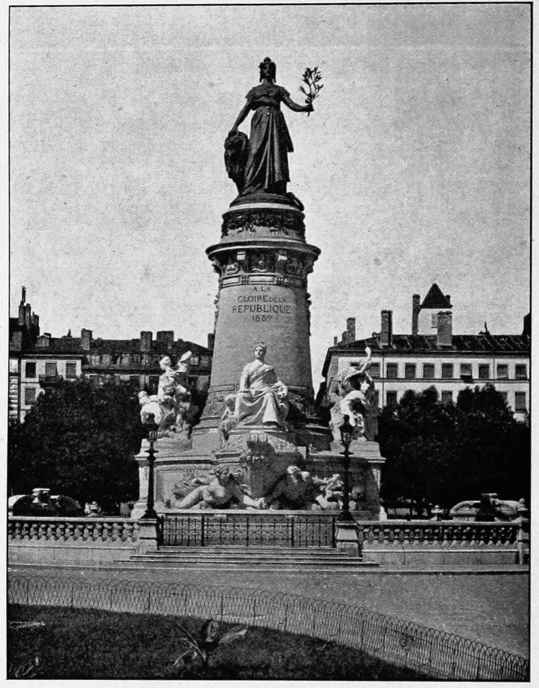 Statue de la République, place Carnot, en 1902.